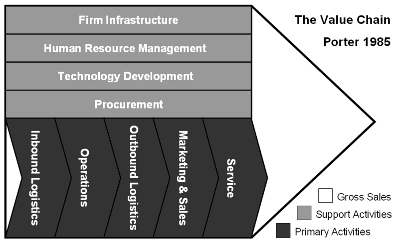 Value Chain Porter 1985